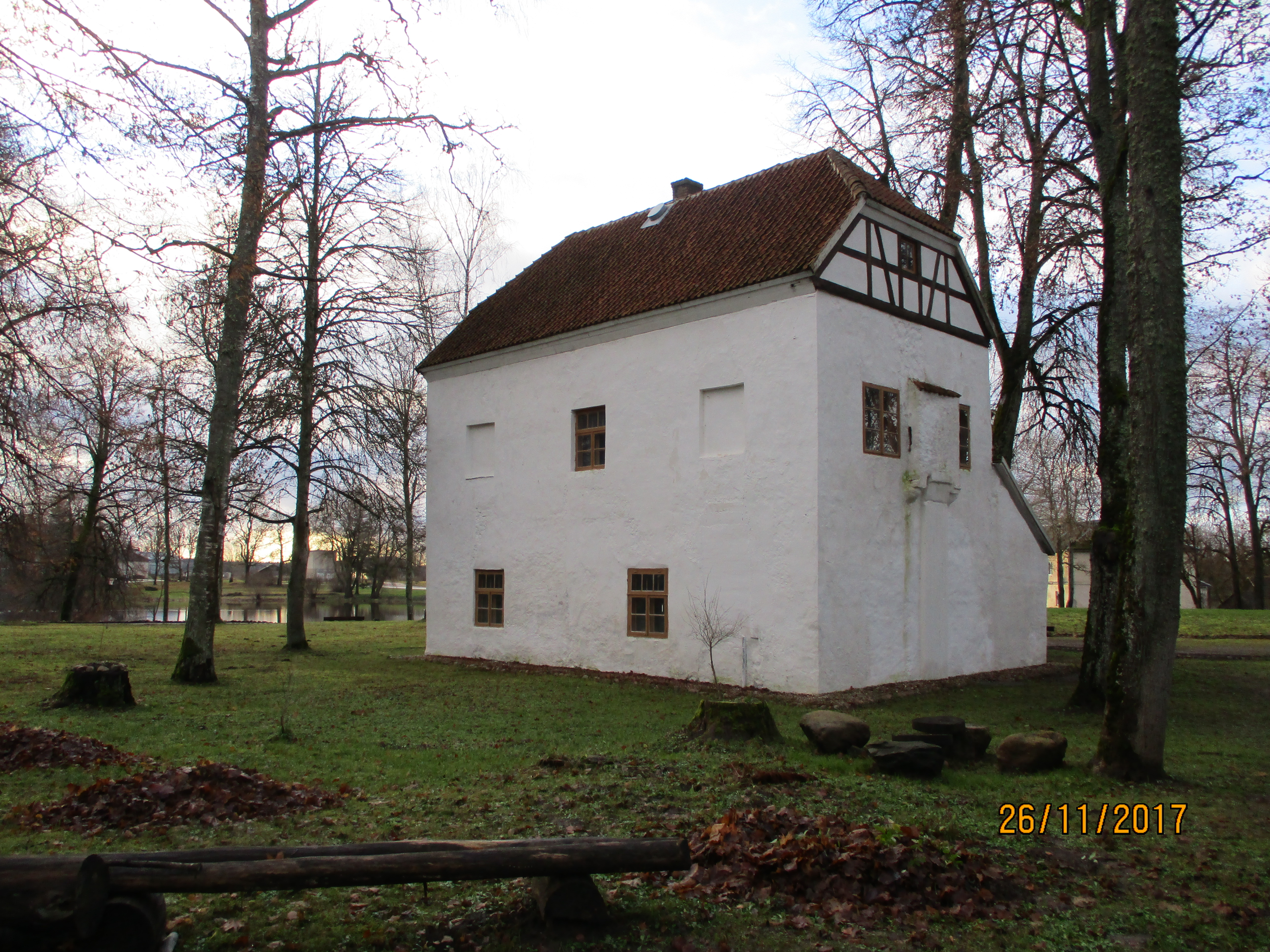 Linnuse idanurk